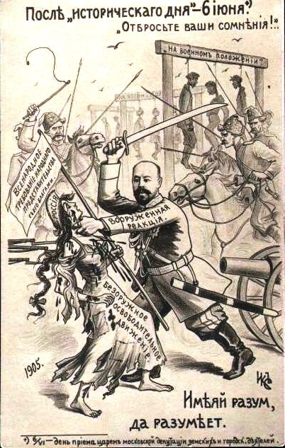 М. Чемоданов (псевд.: Икс). После «исторического дня» — 6 июня*/. «Отбросьте ваши сомнения!..» Открытка. 1905. Типография Д. И. Песчанского (Москва) / 6 [19] июня 1905 — день приёма царём [Николаем II] московской депутации земских и городск деятелей [после которого генерал Д. Ф. Трепов получил расширенные полномочия для наведения порядка в стране] Открытка. 1905. Типография Д. И. Песчанского (Москва)